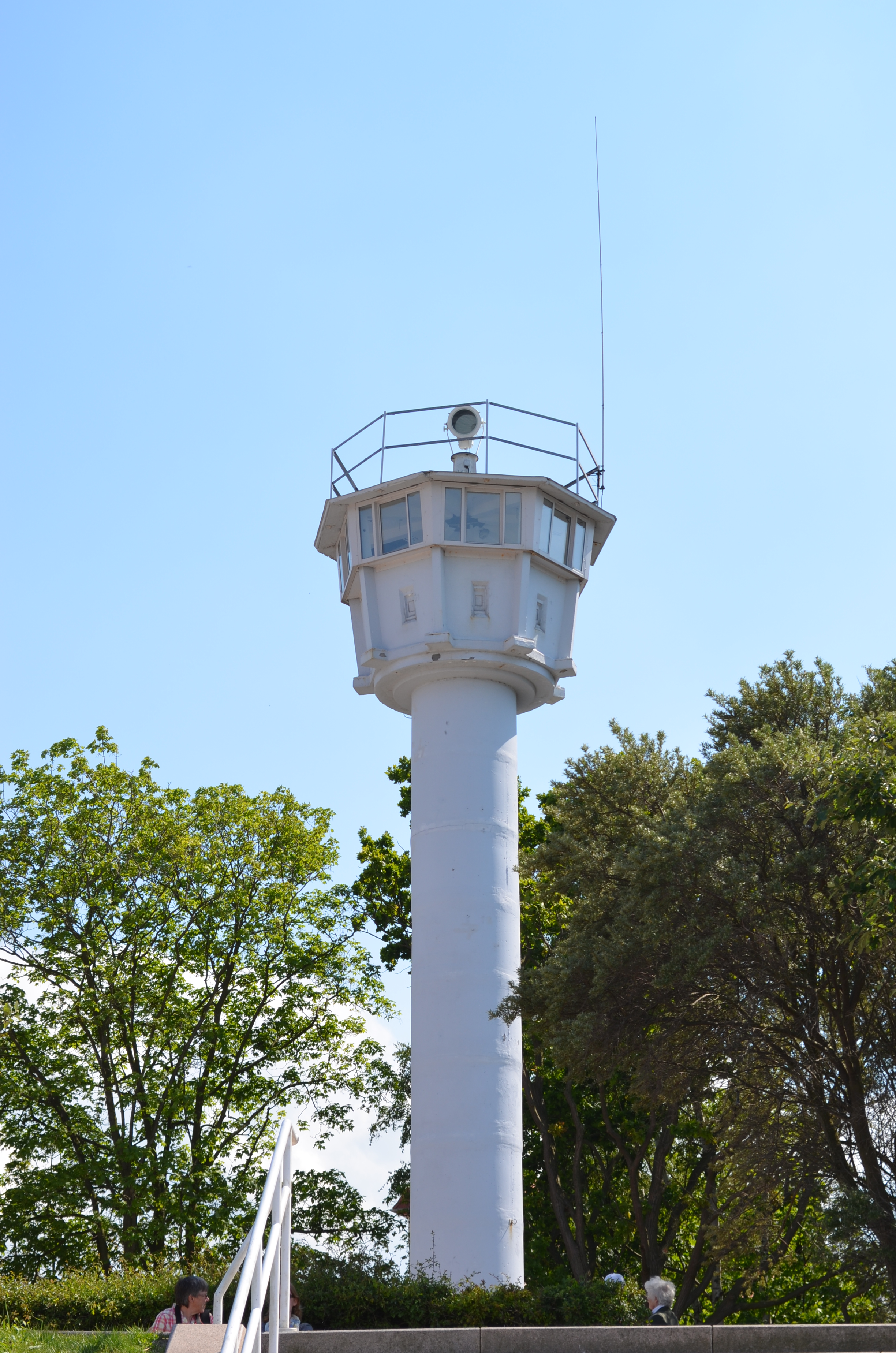 Kühlungsborn Handy\Kühlungsborn, Ostseeallee, Ehemaliger Grenzwachturm, von der Seeseite aus